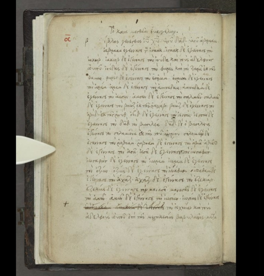 Codex Montfortianus page 7 verso Mt 1